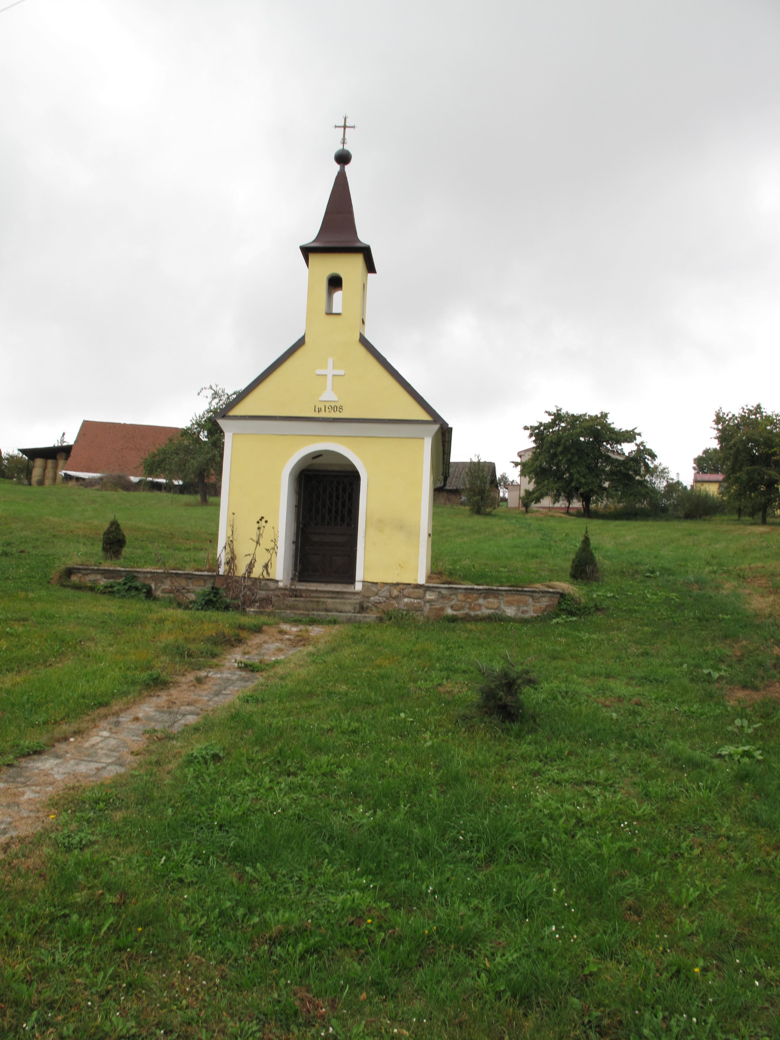 Kaplička v Tisku. Okres Benešov, Česká republika.